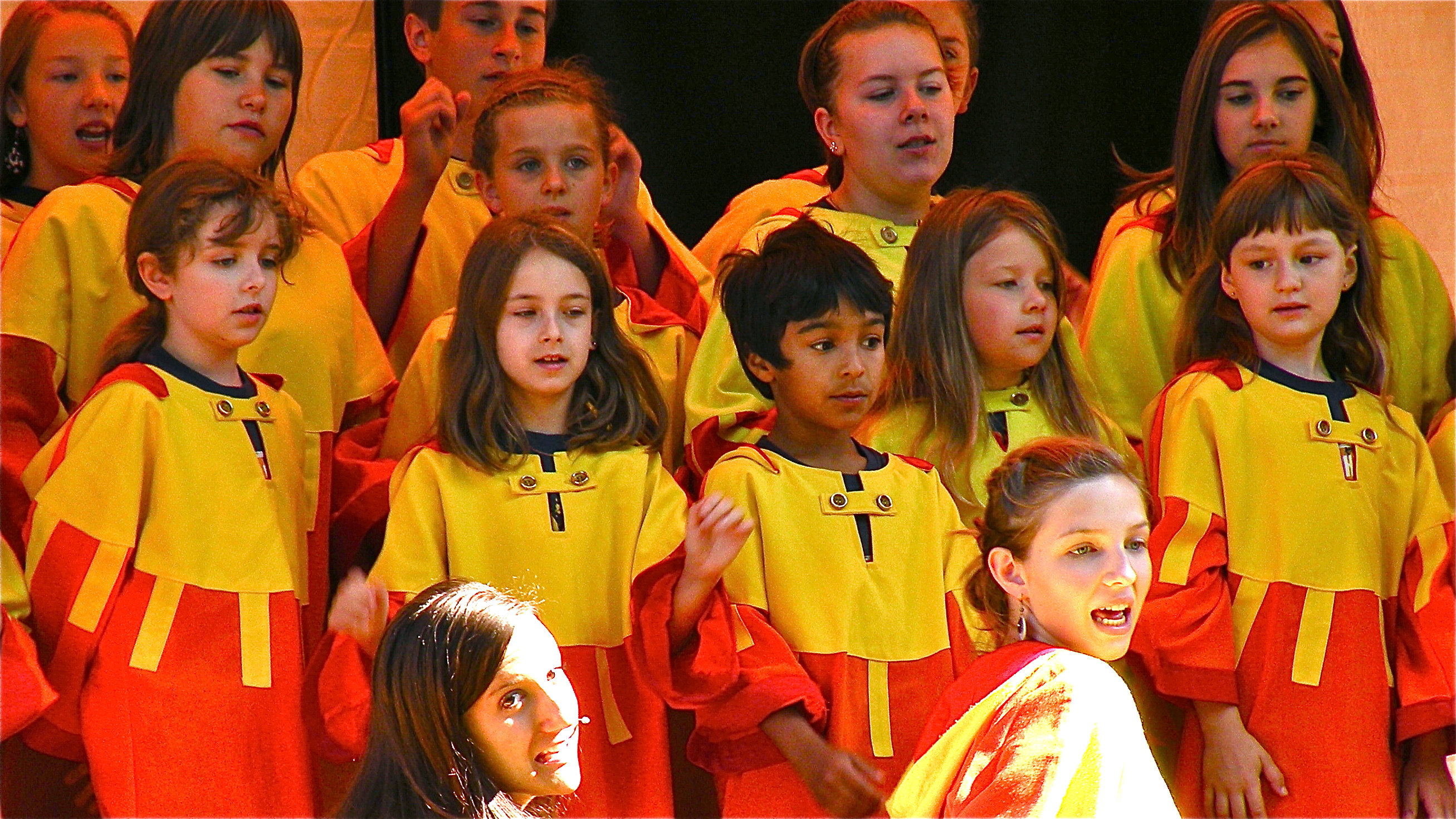 Kisi Kids Mitgestaltung eines Gottesdienstes bei den Mühlviertler Kinderspielen in Perg